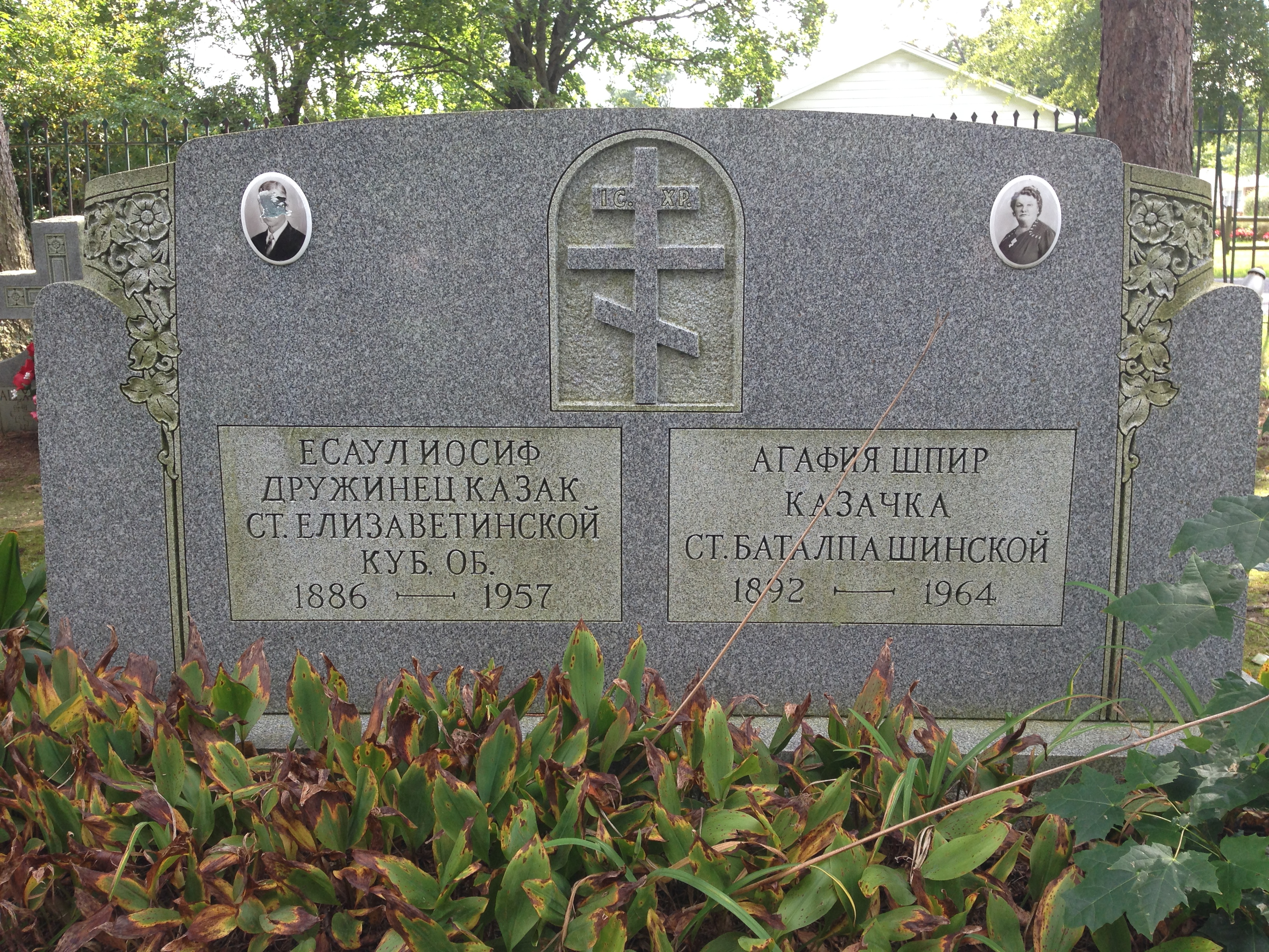 Фото могилы Иосифа Дружинца, США, Вайнленд. Похоронен вместе с Агафьей Шпир.